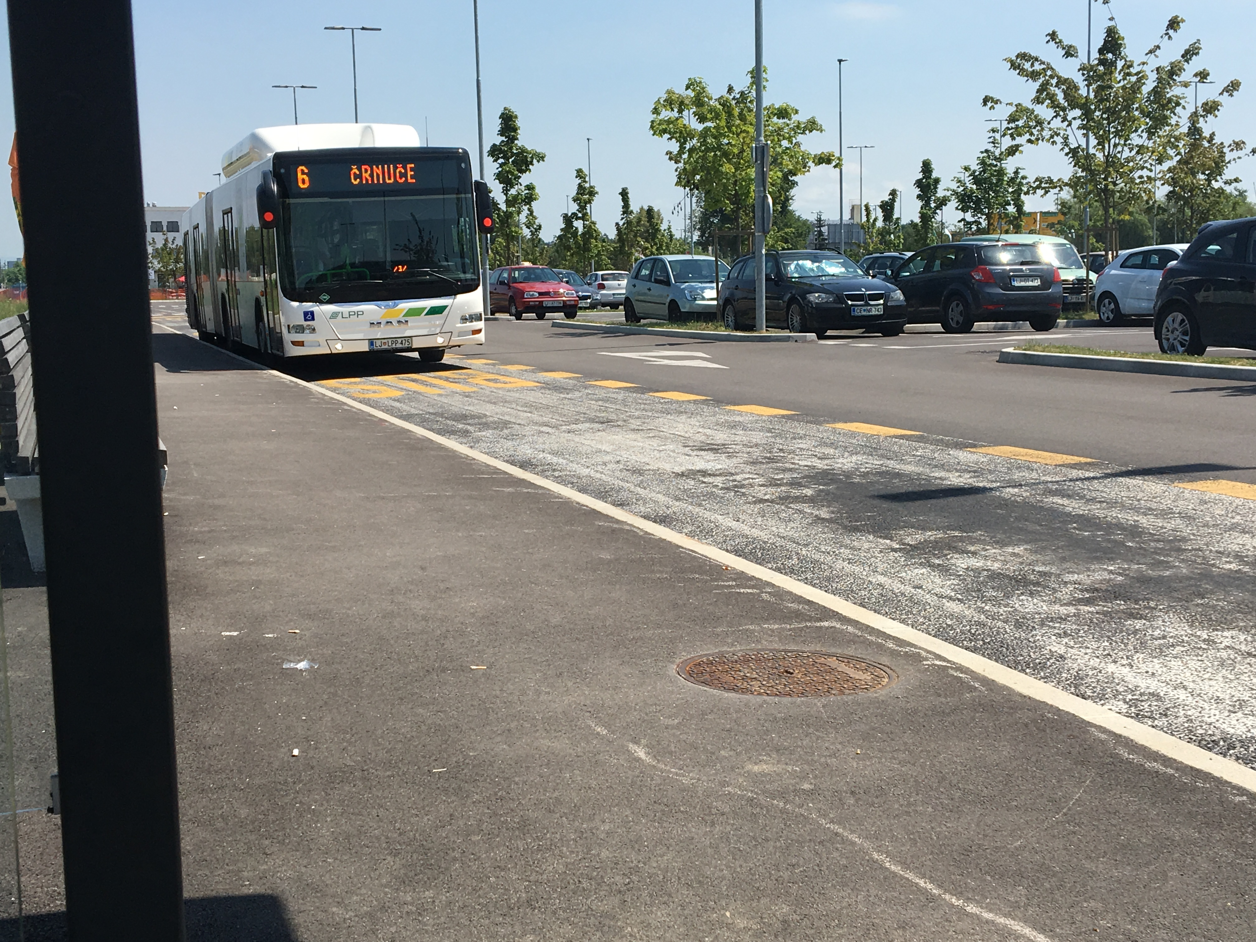 avtobus na liniji 6 na Dolgem mostu P+R